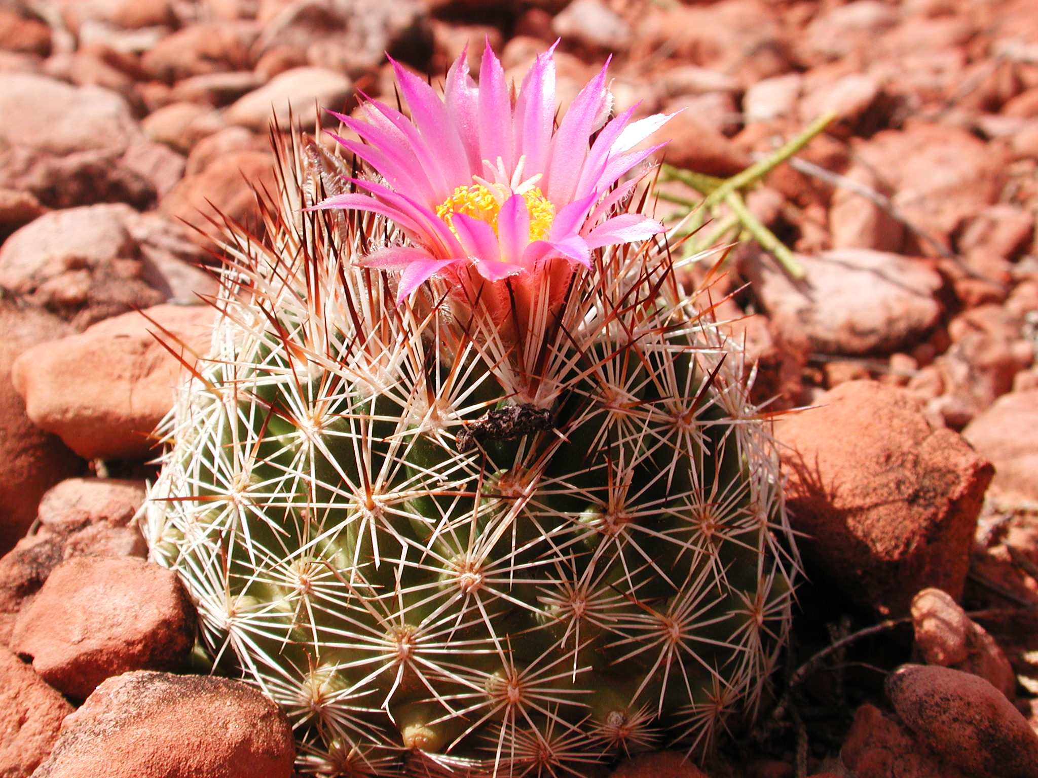 Escobaria vivipara (Coryphantha vivipara) near Sedona, Arizona, USA.